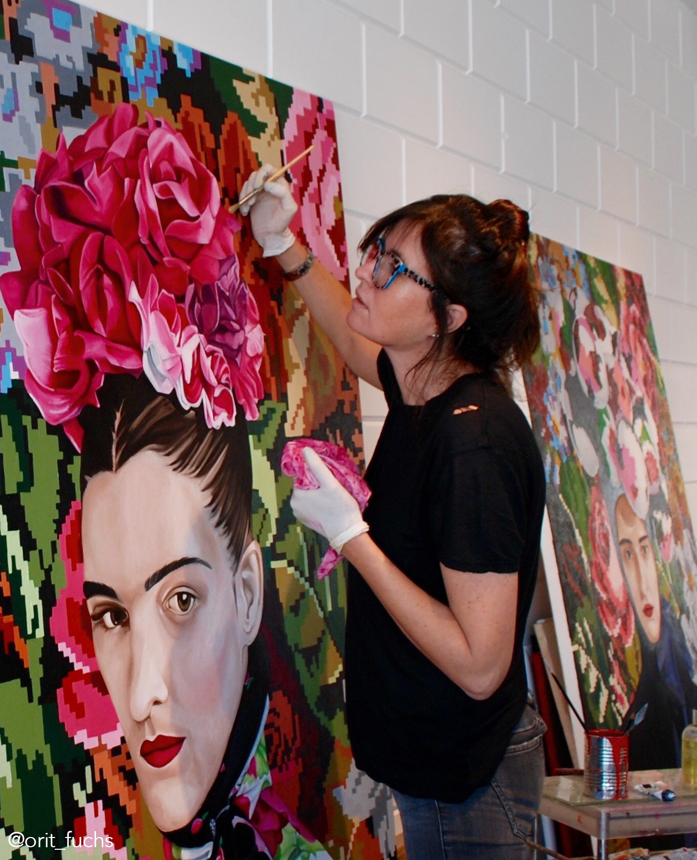 אורית פוקס מציירת